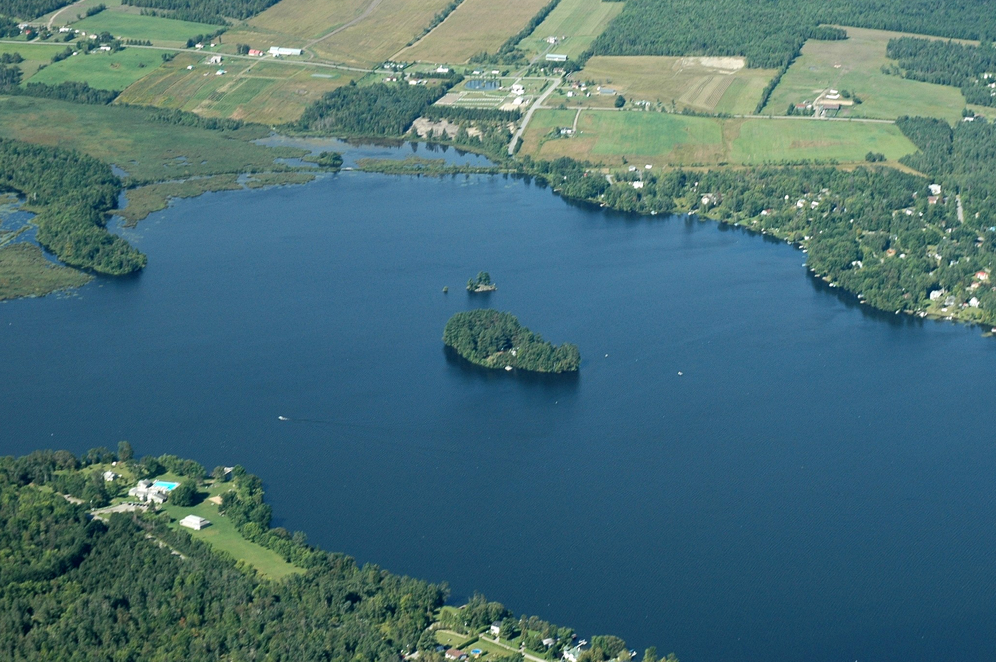 Vue aérienne de l'archipel Marinier dans la partie sud du lac Magog